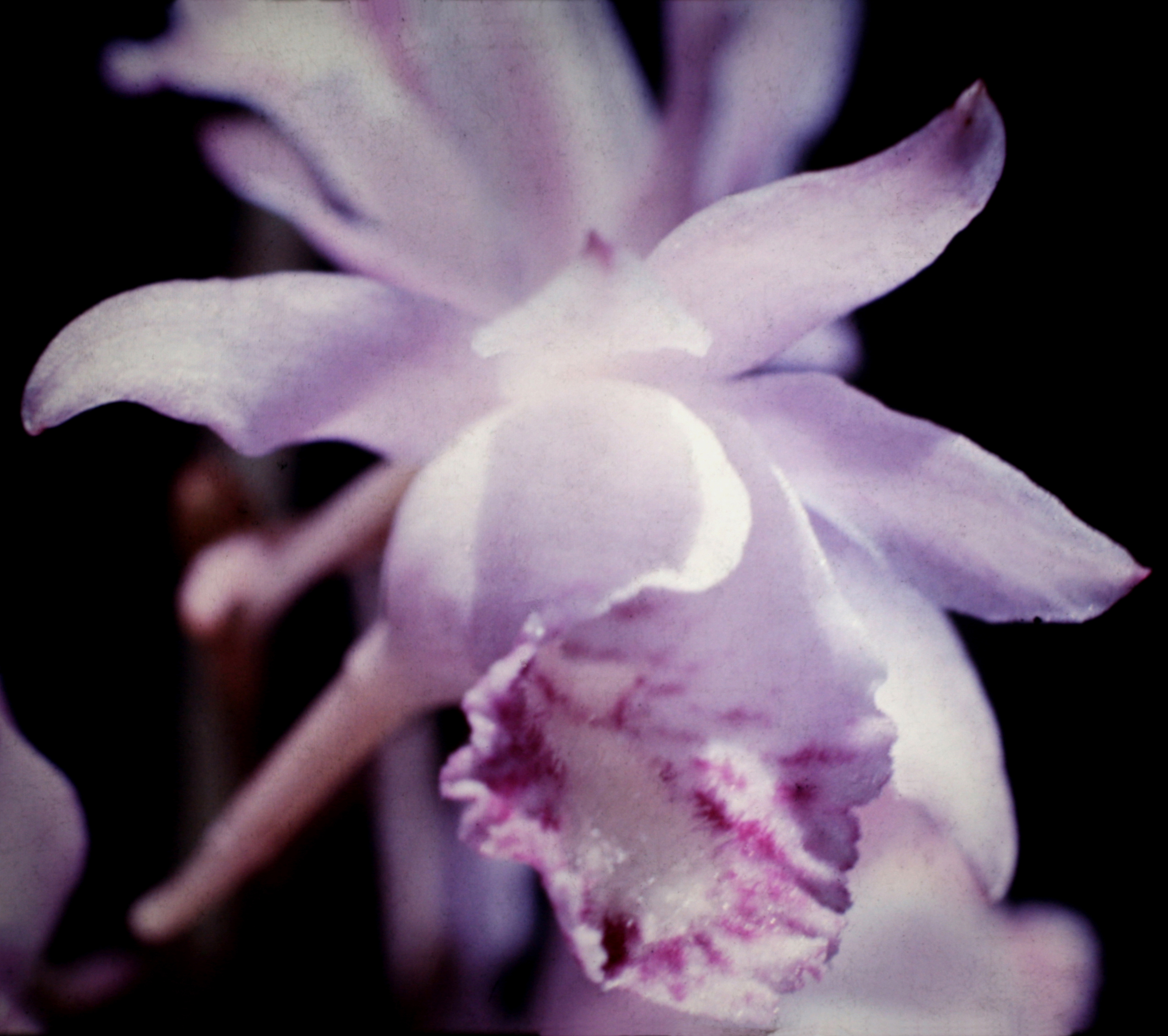 Galeandra styllomisantha, Suriname. Zanderij savanna, near plantation Berlijn